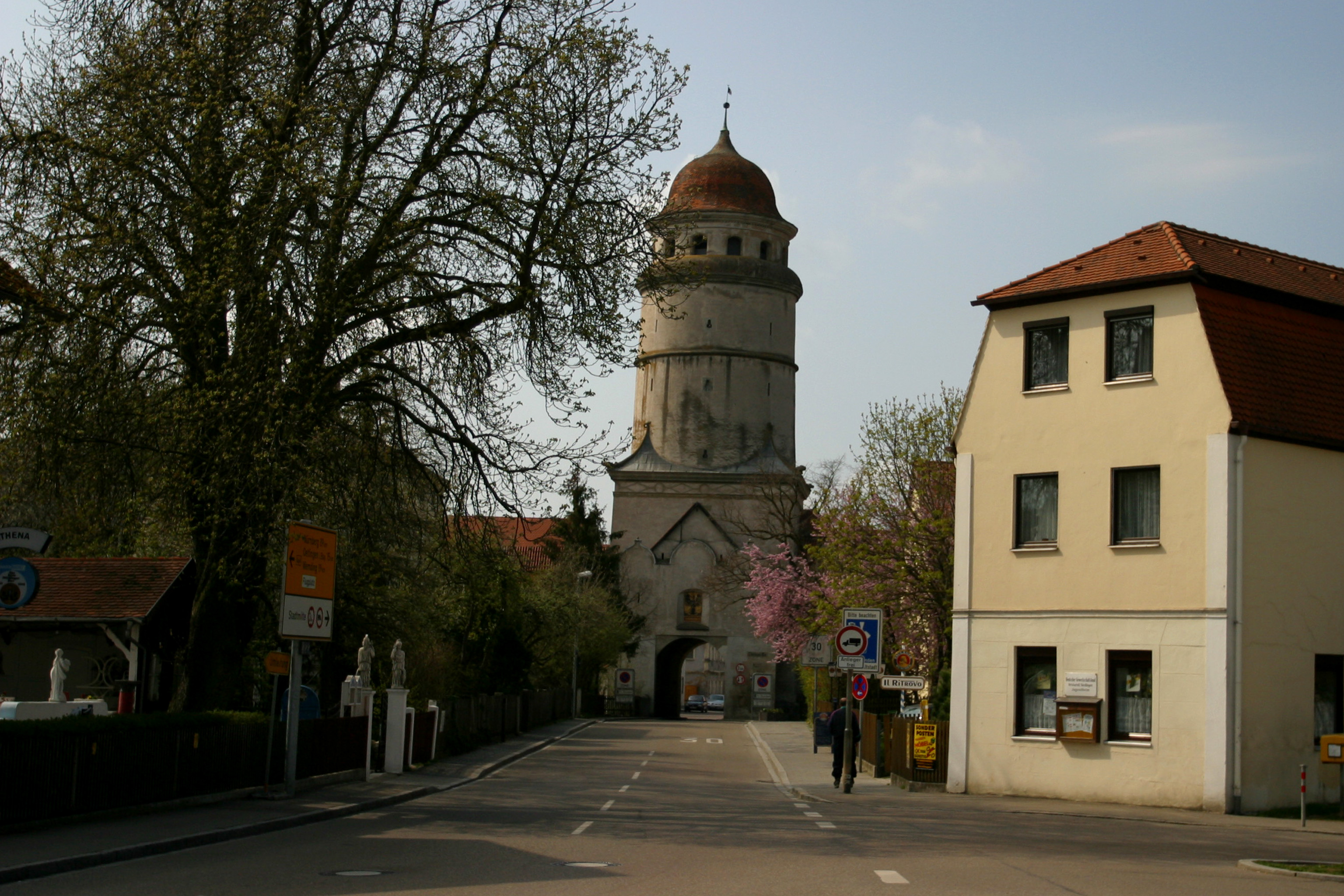 Picture from Nördlingen (Bayern) Löpsinger Tor